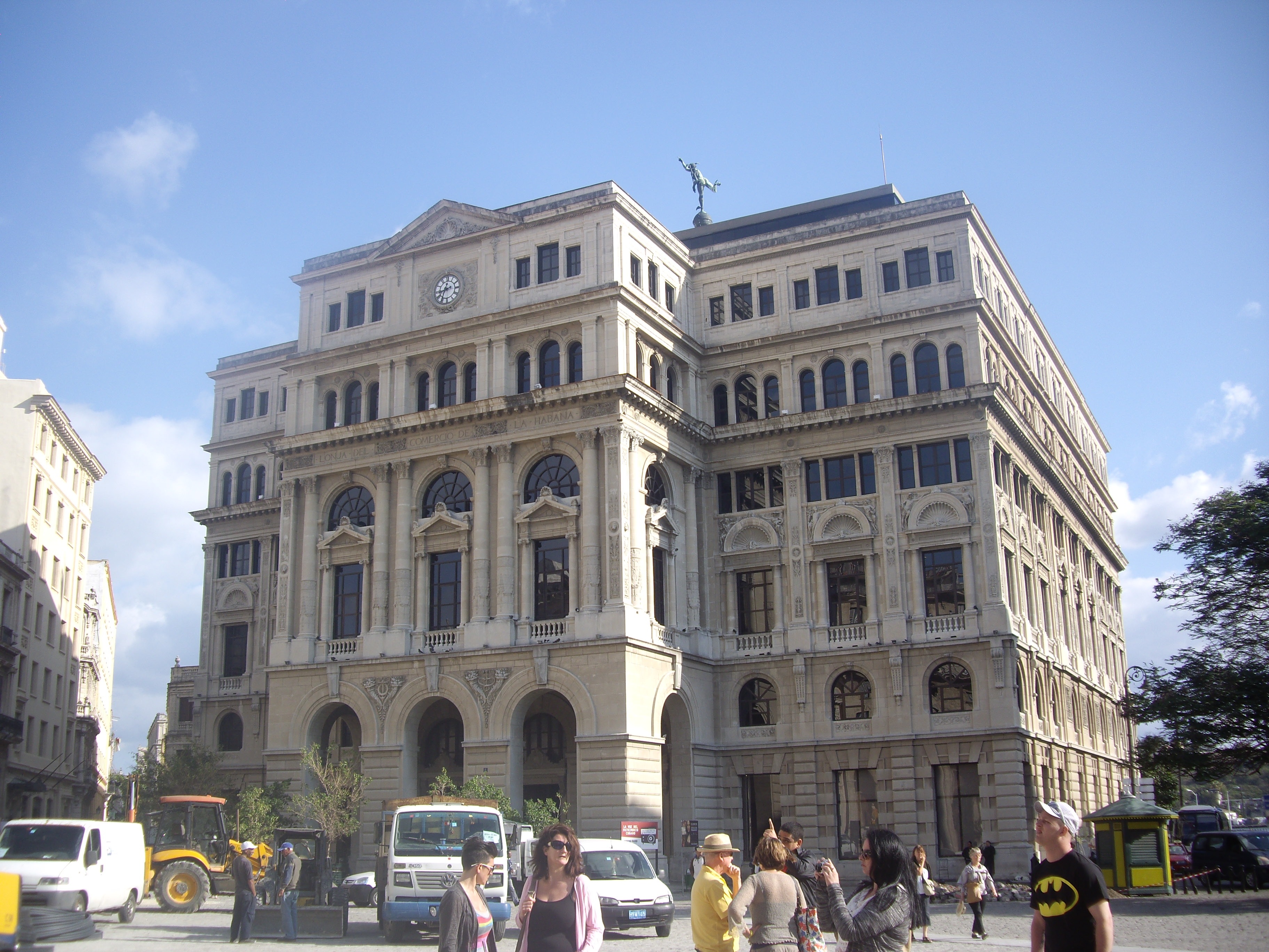 Llotja de Comerç a la plaça San Francisco de Asís de l'Havana